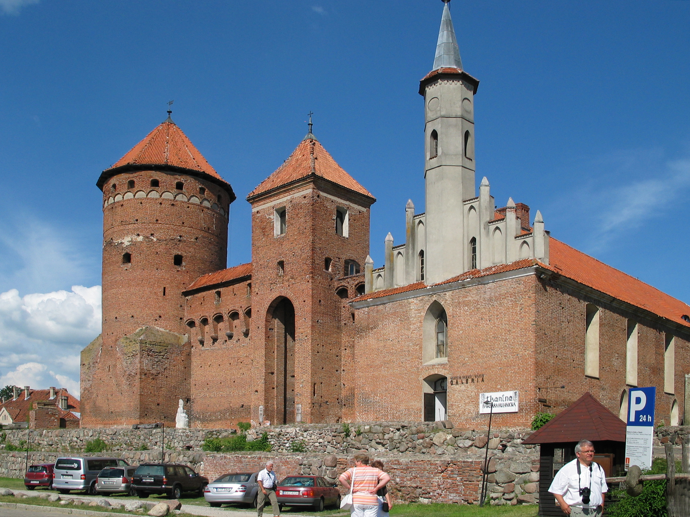 Zamek w Reszlu